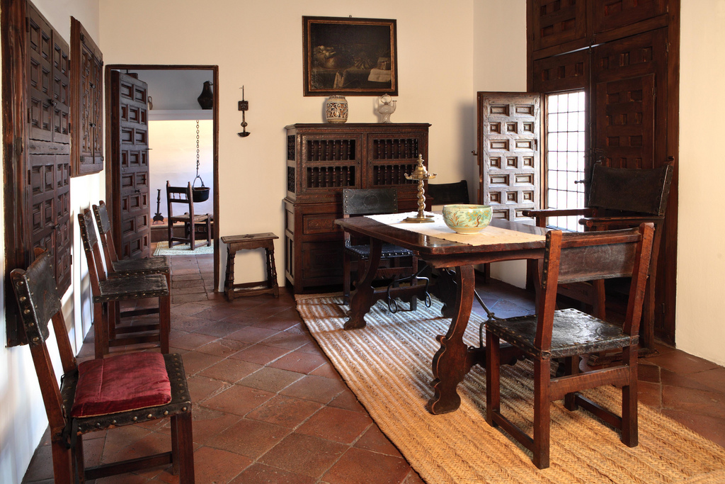 Comedor en la Casa Museo de Lope de Vega, en Madrid (España).